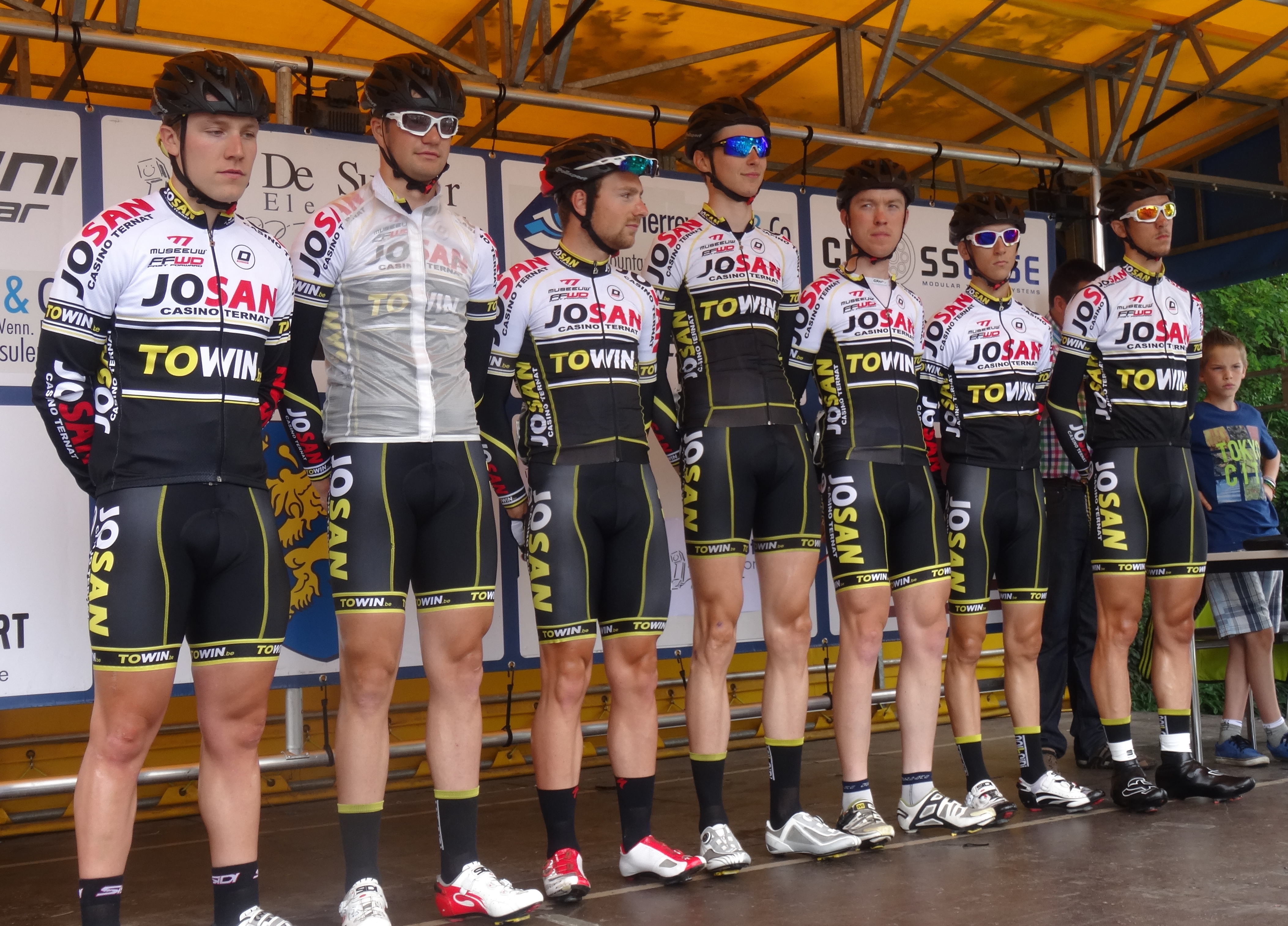 Reportage photographique réalisé le samedi 5 juillet à l'occasion du départ et de l'arrivée du Circuit Het Nieuwsblad espoirs 2014 à Grotenberge (Zottegem), Belgique.